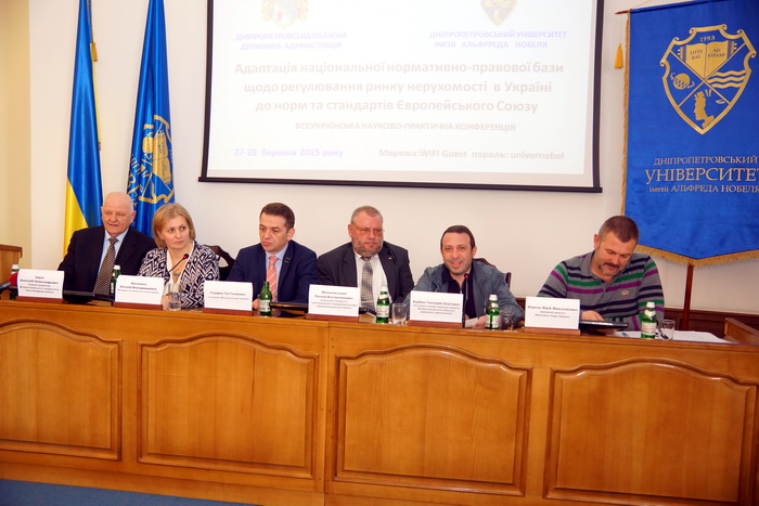 Василина Наталія Володимирівна на Всеукраїнській конференції в Університеті Альфреда Нобеля "Імплементація європейських норм та стандартів", присвячена імплементації європейських норм та стандартів щодо електронного документообігу в системі юстиції, запровадження нових методів та стандартів в процедурі реєстрації речових прав на нерухоме майно та їх обтяжень з урахуванням змін в адміністративній системі органів юстиції в Україніза участі заступника міністра юстиції Україн Гія Гізойовича Гецадзе, заступника голови Дніпропетровської облдержадміністрації Геннадія Олеговича Корбаня, начальника Головного територіального Управління юстиції в Дніпропетровській обл. Маньковського Леоніда Костянтиновича